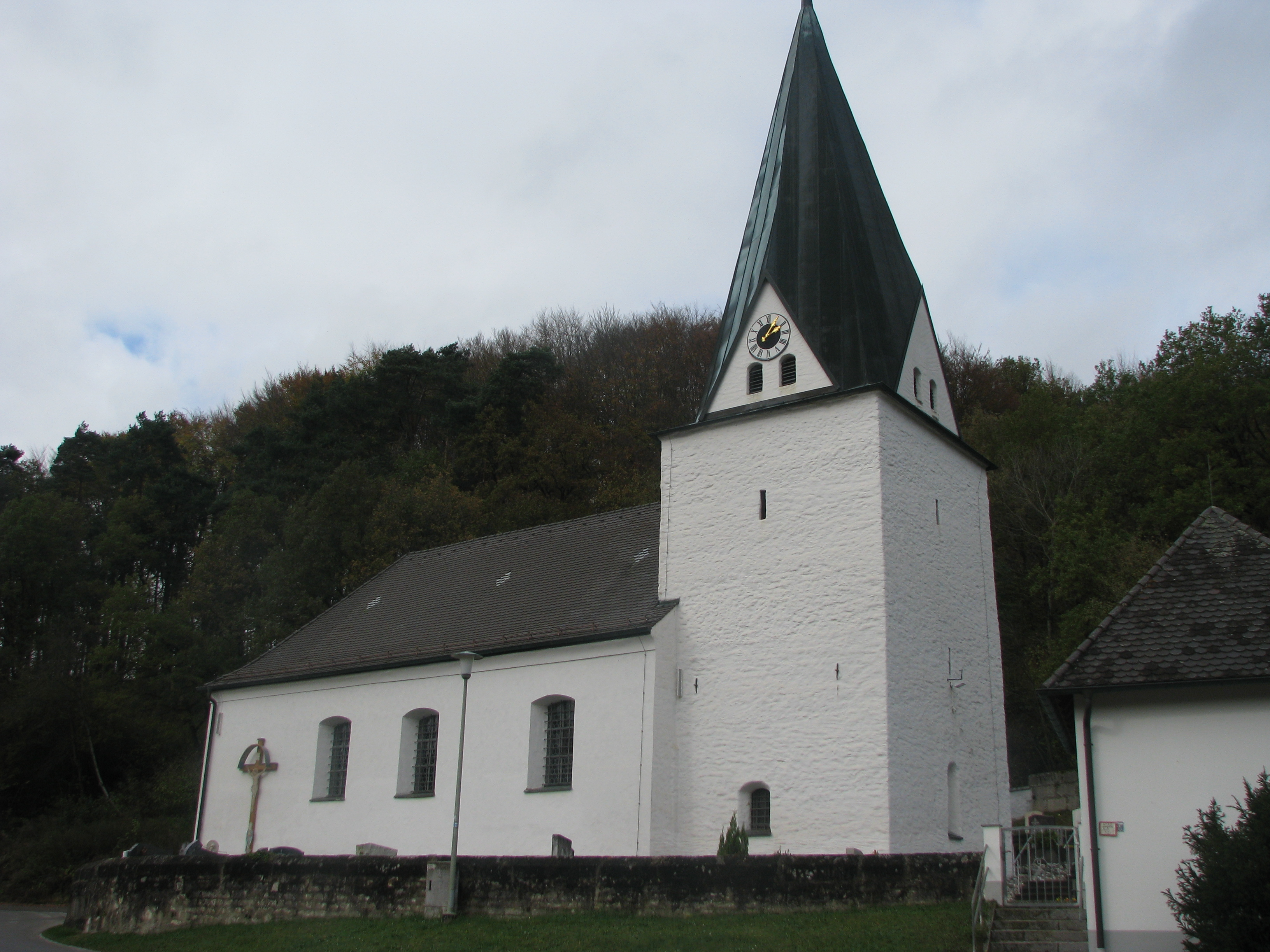 Oberrohrenstadt, Ortsteil der Gemeinde Berg bei Neumarkt in der Oberpfalz, Kath. Filialkirche St. Kolomann